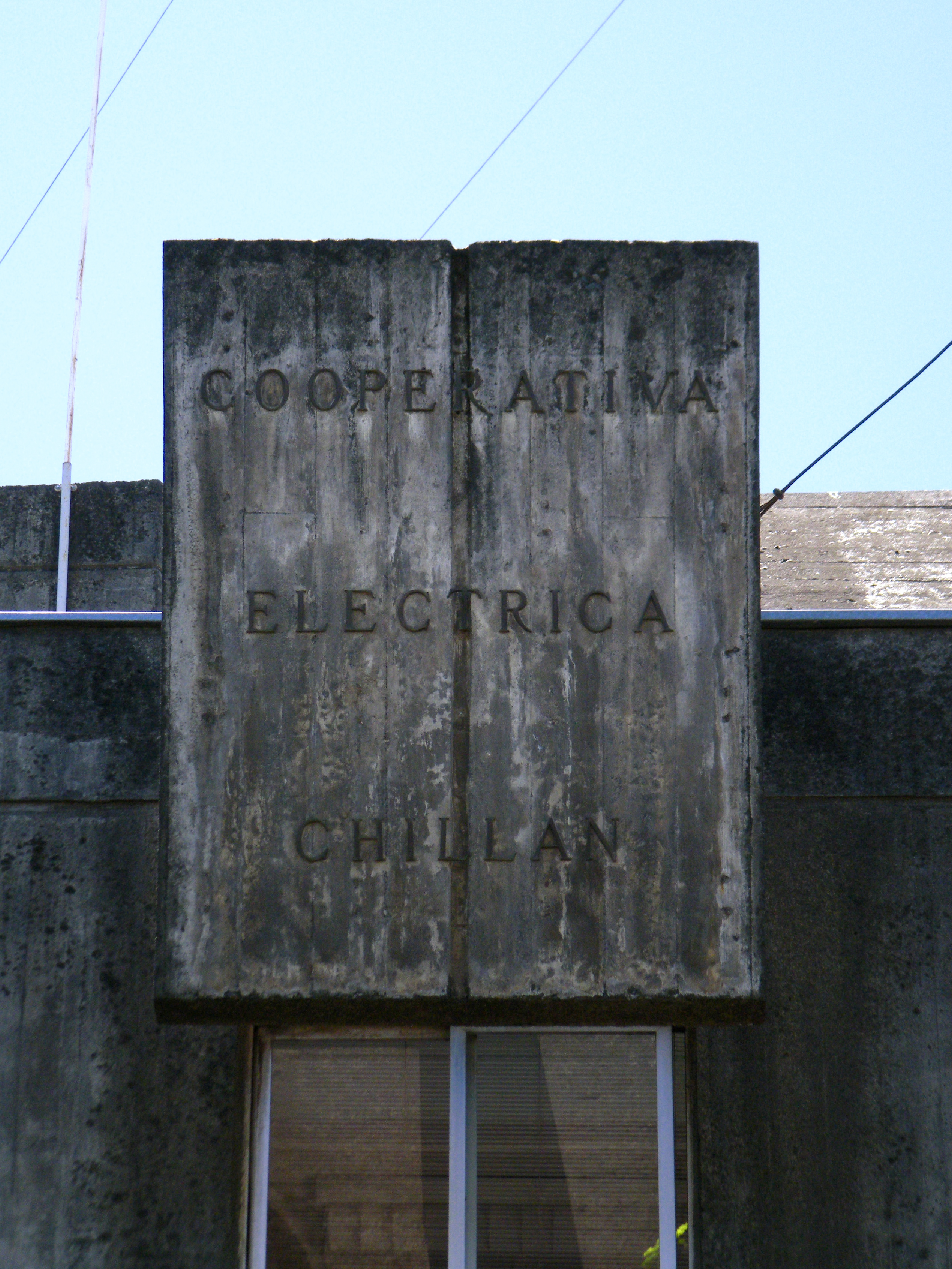 Edificio de la Cooperativa Eléctrica de Chillán, Copelec. Detalle del letrero sobre el acceso principal a las oficinas comerciales, hacia calle Maipón. This is a photo of a national monument in Chile: 2032